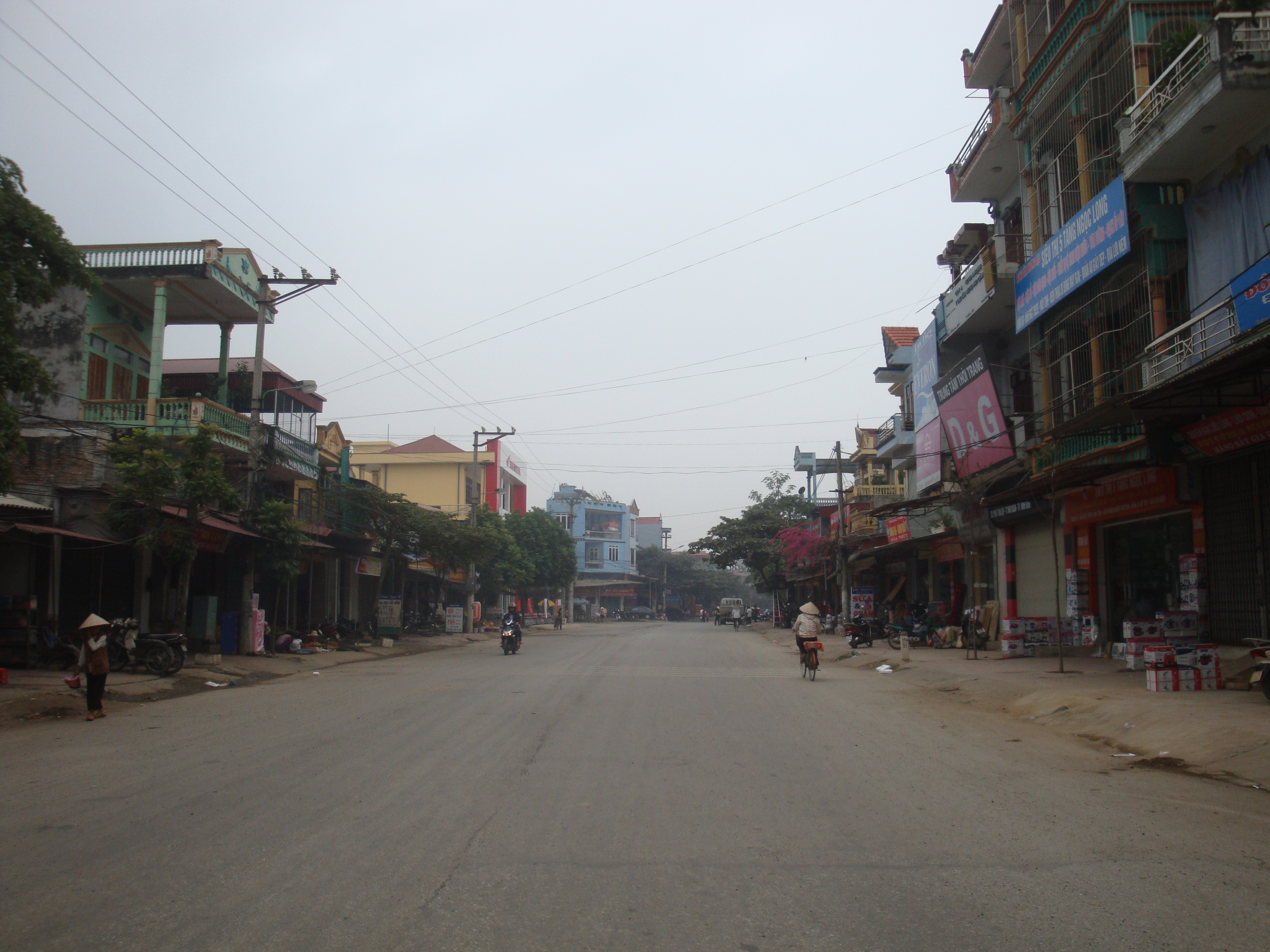 Một đường phố ở thị trấn Nho Quan, Ninh Bình